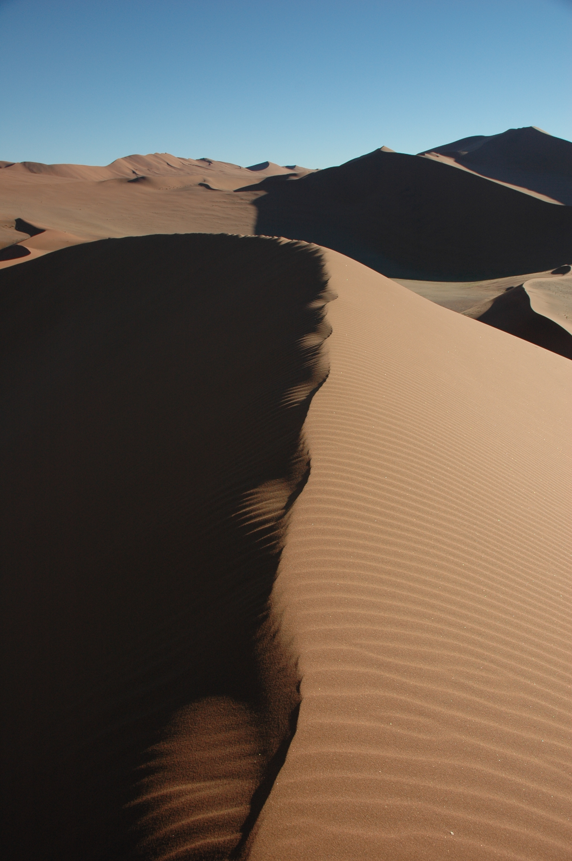 Namibie Sossusvlei Photographie prise par GIRAUD Patrick